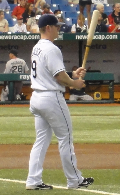 Hank Blalock